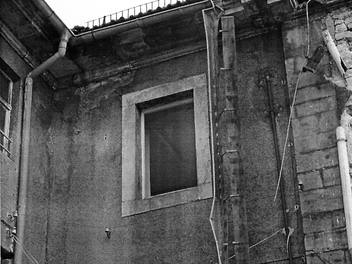 Martinskaserne, Originalfenster